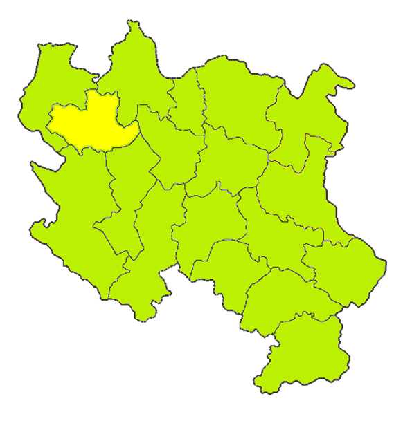 Map of Kolubara